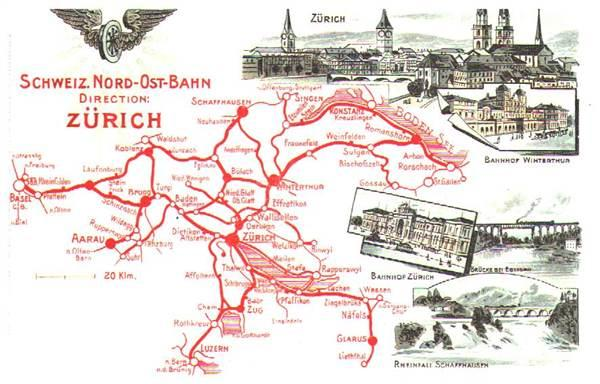 Postkarte mit dem Streckennetz der Schweizerischen Nortdostbahn (ohne Strecke Etzwilen–Schaffhausen)